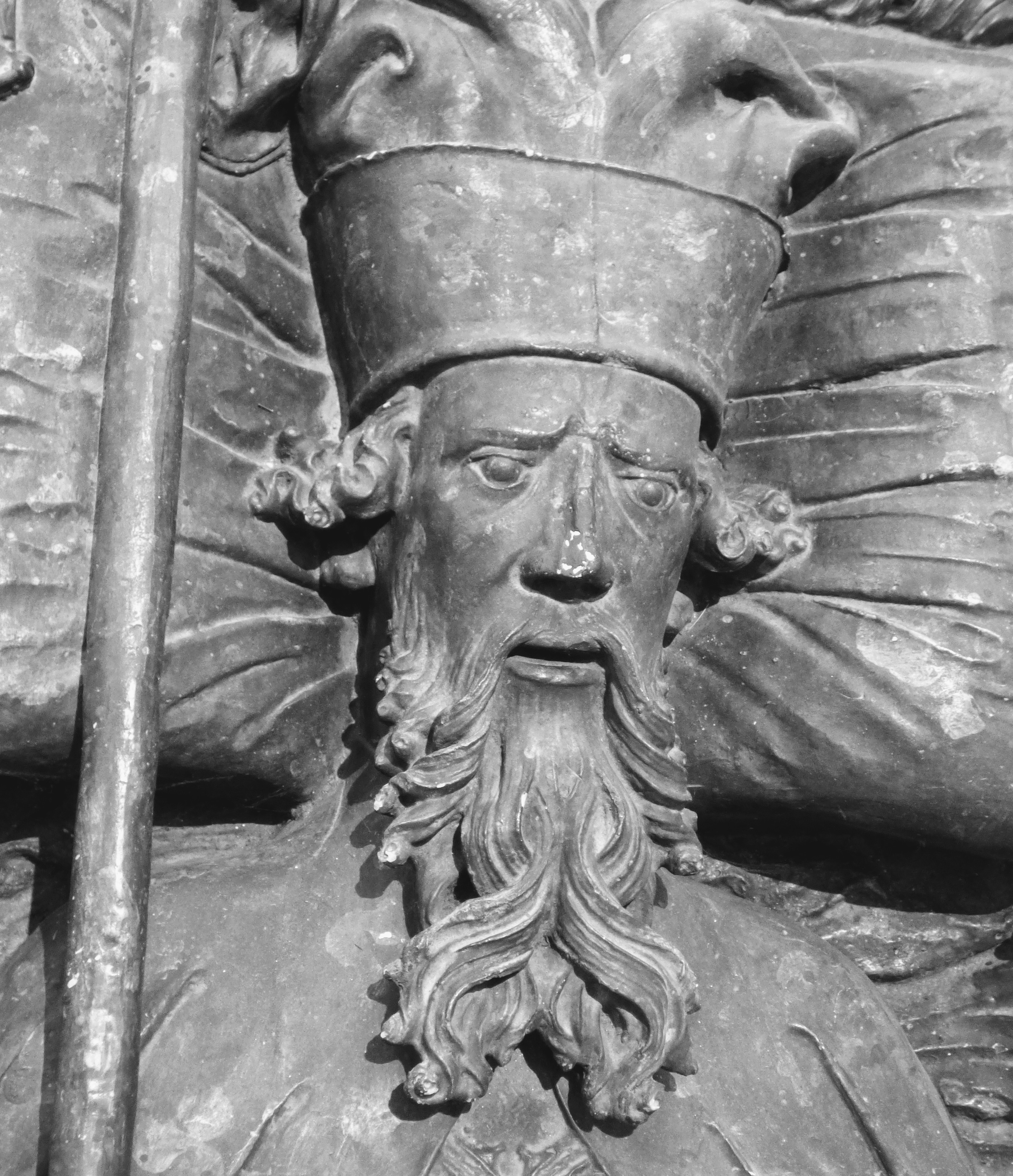 Pfalzgraf Aribo I Abguss des Stiftergrabs, das Hans Haider knapp vor 1400 im Stift Seeon schuf. Der Abguss ist Eigentum des Museums der Stadt Krems, und befindet sich als Leihgabe im Stiftsmuseum Millstatt, Kärnten